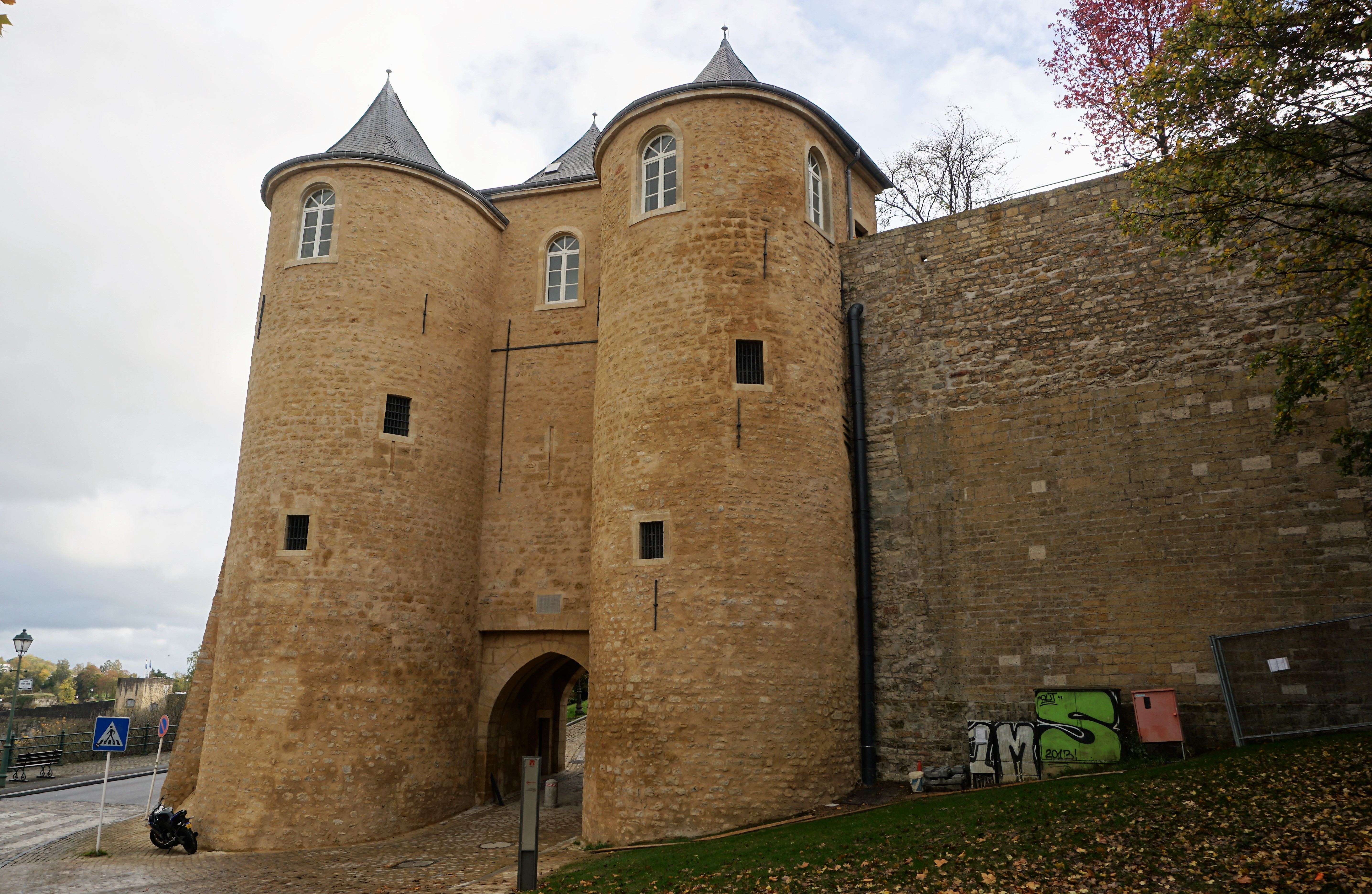 Luxembourg, Porte du Pfaffenthal, dite « Dräi Tierm » (trois tours). Vue sur la face nord.